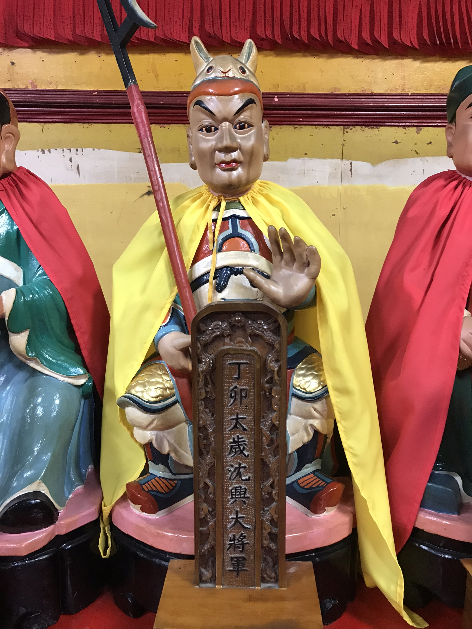 丁卯太歲沈興大將軍神像